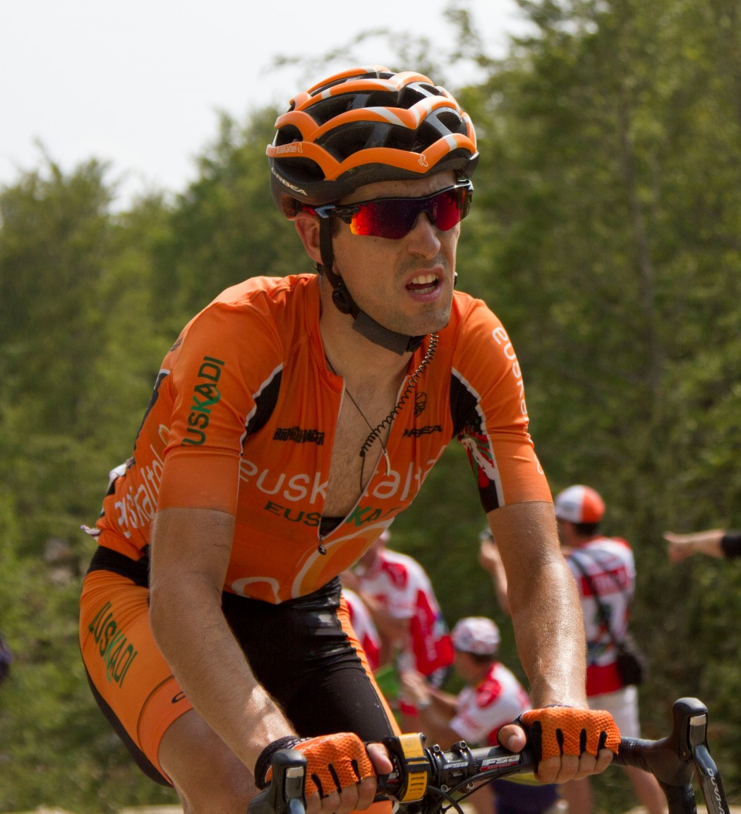 021 nieve